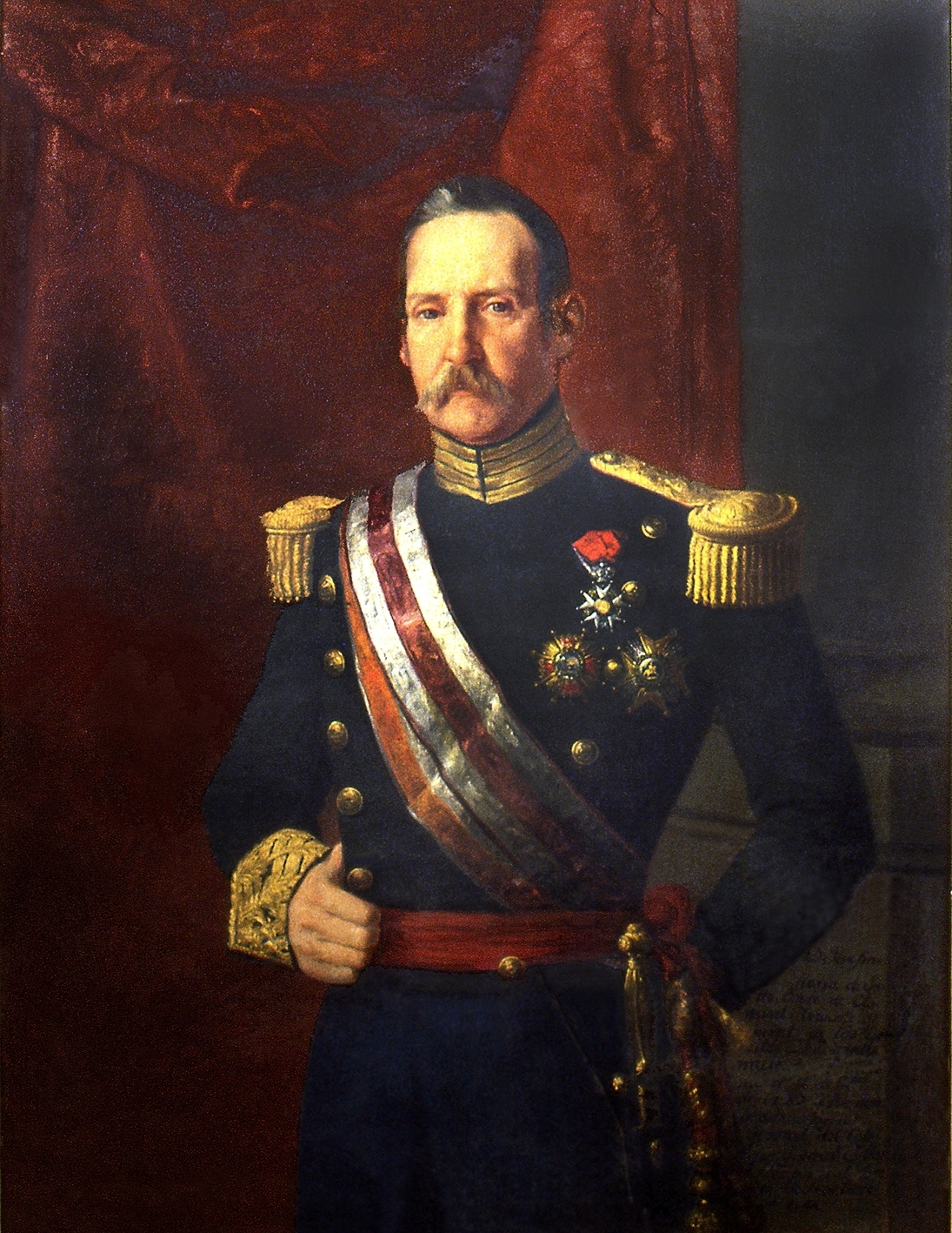 Retrato del teniente general Serafín María de Sotto (1793-1862), que fue conde de Clonard y marqués de la Granada y también presidente del Consejo de Ministros durante el reinado de Isabel II de España y capitán general de Andalucía. Este lienzo está depositado y expuesto al púbico en el Museo del Ejército, situado en el Alcázar de Toledo, y el retratado viste el uniforme de teniente general de los Ejércitos Nacionales españoles.